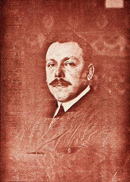 Luis Galdames Galdames, (Melipilla 8 de octubre de 1881- 20 de noviembre de 1941). Abogado, profesor, historiador y político chileno. Participó en la polémica del centenario por la educación en Chile. Creador del Reglamento General de Educación Secundaria. Uno de los fundadores del Partido Nacional y de los redactores de la Constitución de 1925.